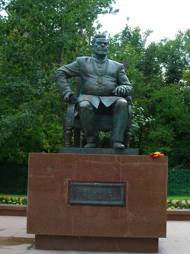 Памятник А. И. Текутьеву на Текутьевском бульваре (ул. Республики) в Тюмени